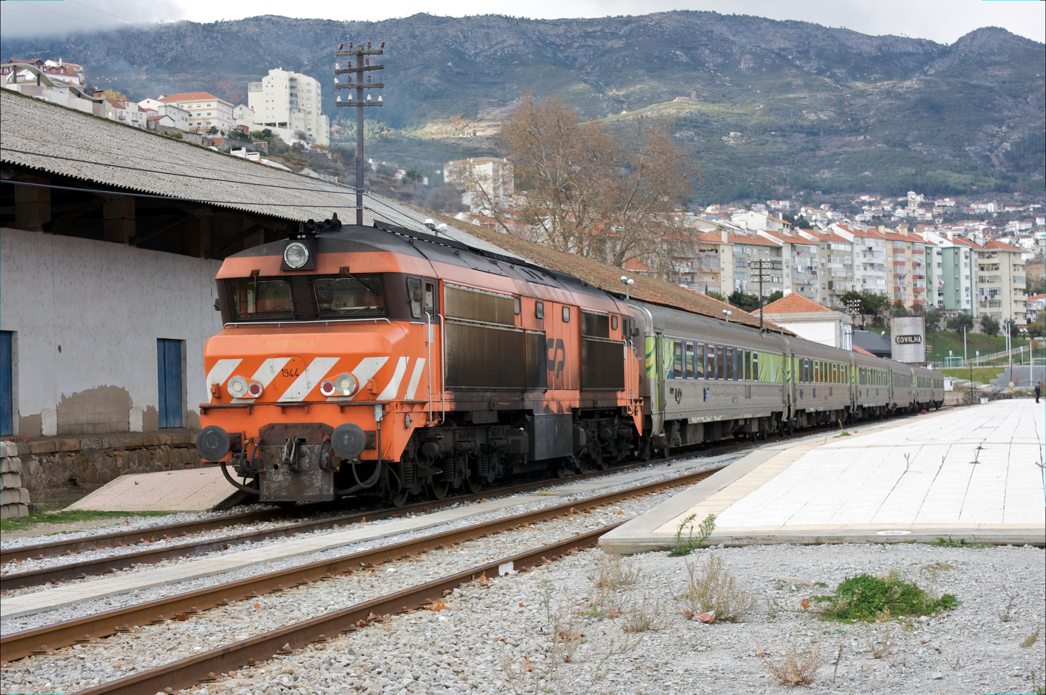 Tipo: Comboio Intercidades 542 [Covilhã - Lisboa • Santa Apolónia] Local: Estação da Covilhã [Linha da Beira Baixa, PK 162] Data e hora: 8 de Dezembro de 2008 [15h02] Material: Locomotiva 1944 + 6 carruagens (5 Sorefame Renovadas + 1 Corail)